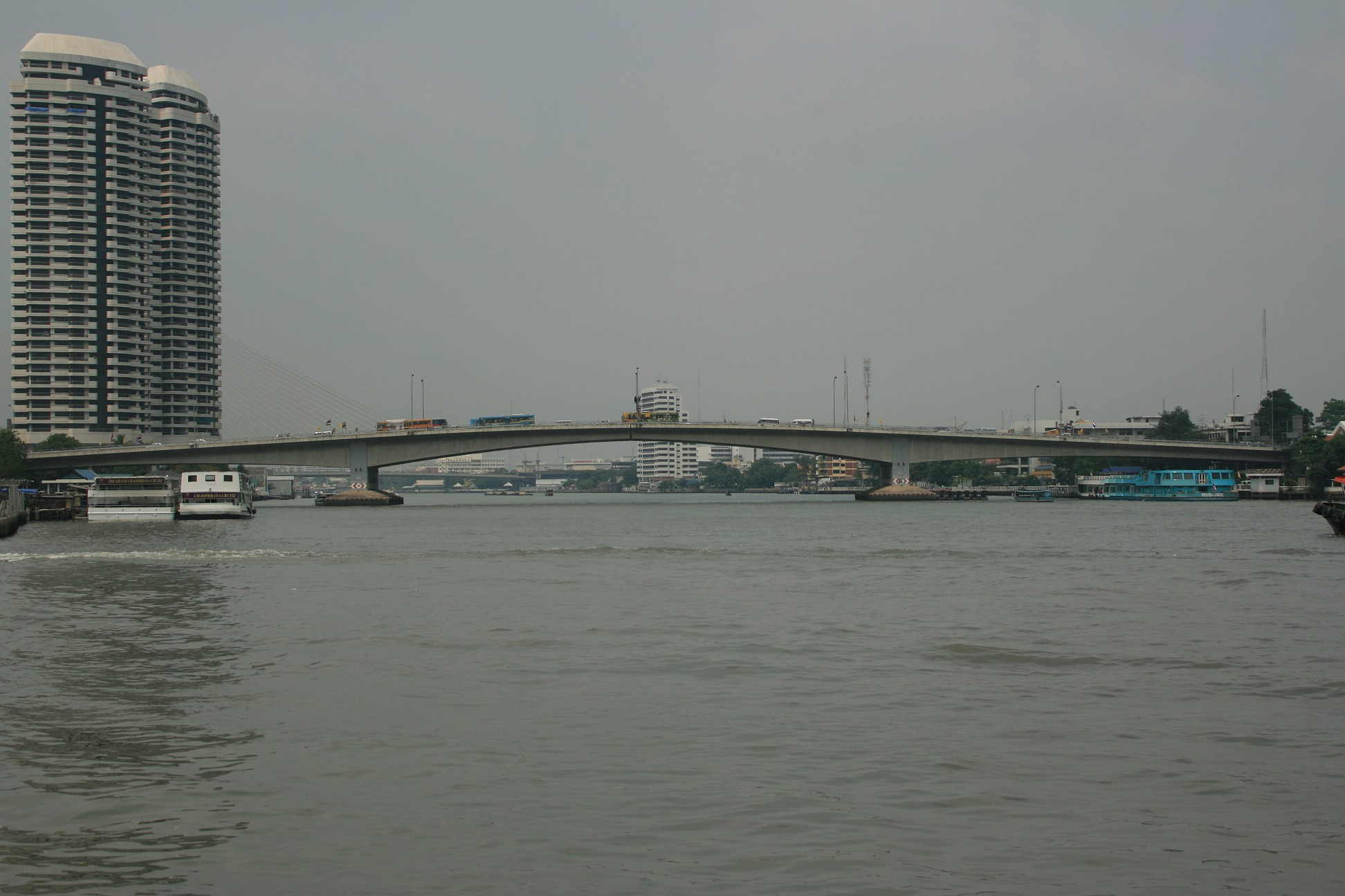 Phra Pin Klao Bridge, Bangkok